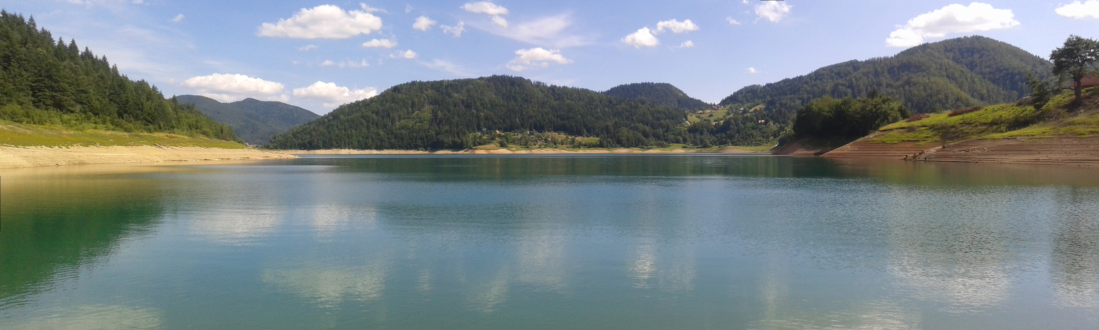 Zaovine panorama